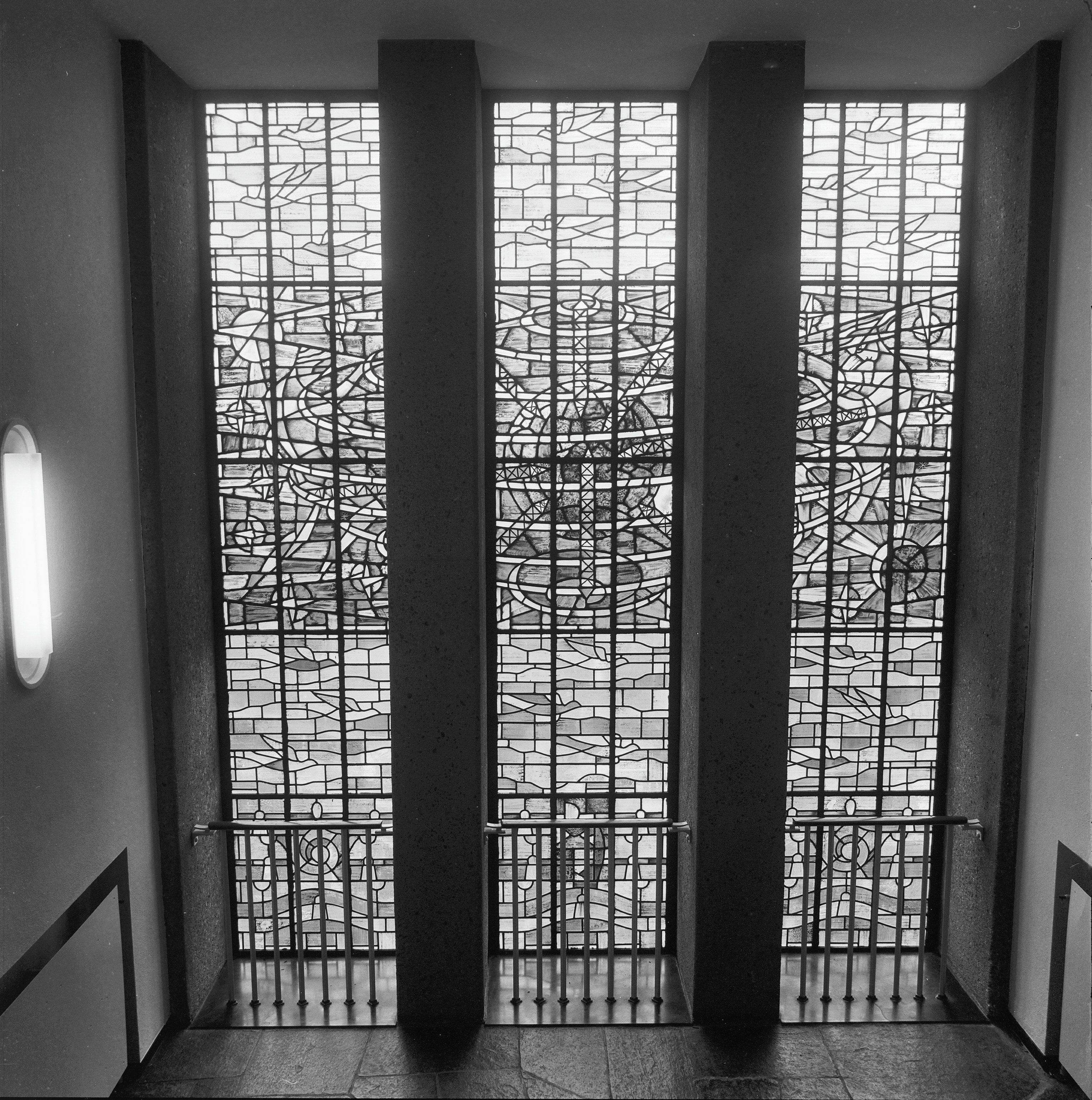 HOOFDPOSTKANTOOR: INTERIEUR, TRAPPENHUIS, OVERZICHT GLAS IN LOODRAAM (RBK)